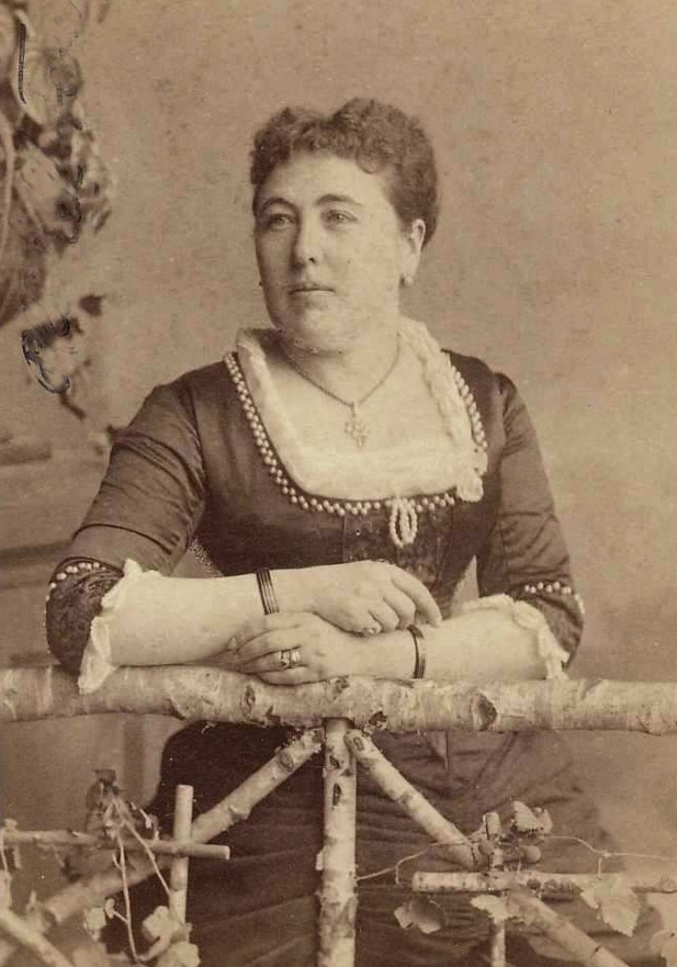 Plihál Ferencné pósfai Horváth Gabriella (1842-1927), Nagykanizsa